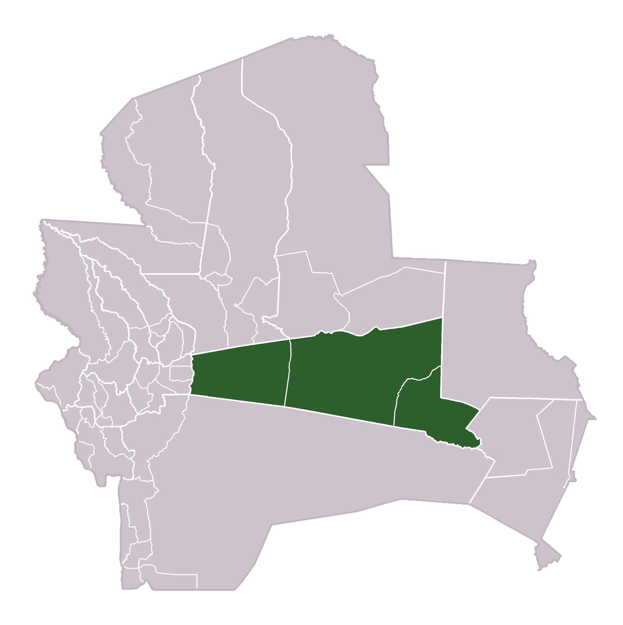 Mapa de la provincia Chiquitos del Departamento de Santa Cruz, Bolivia.